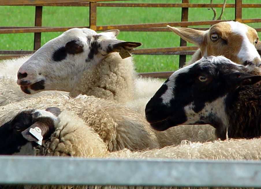 Kopstudie van Schoonebeker schapen, bij de kudde van Doldersum